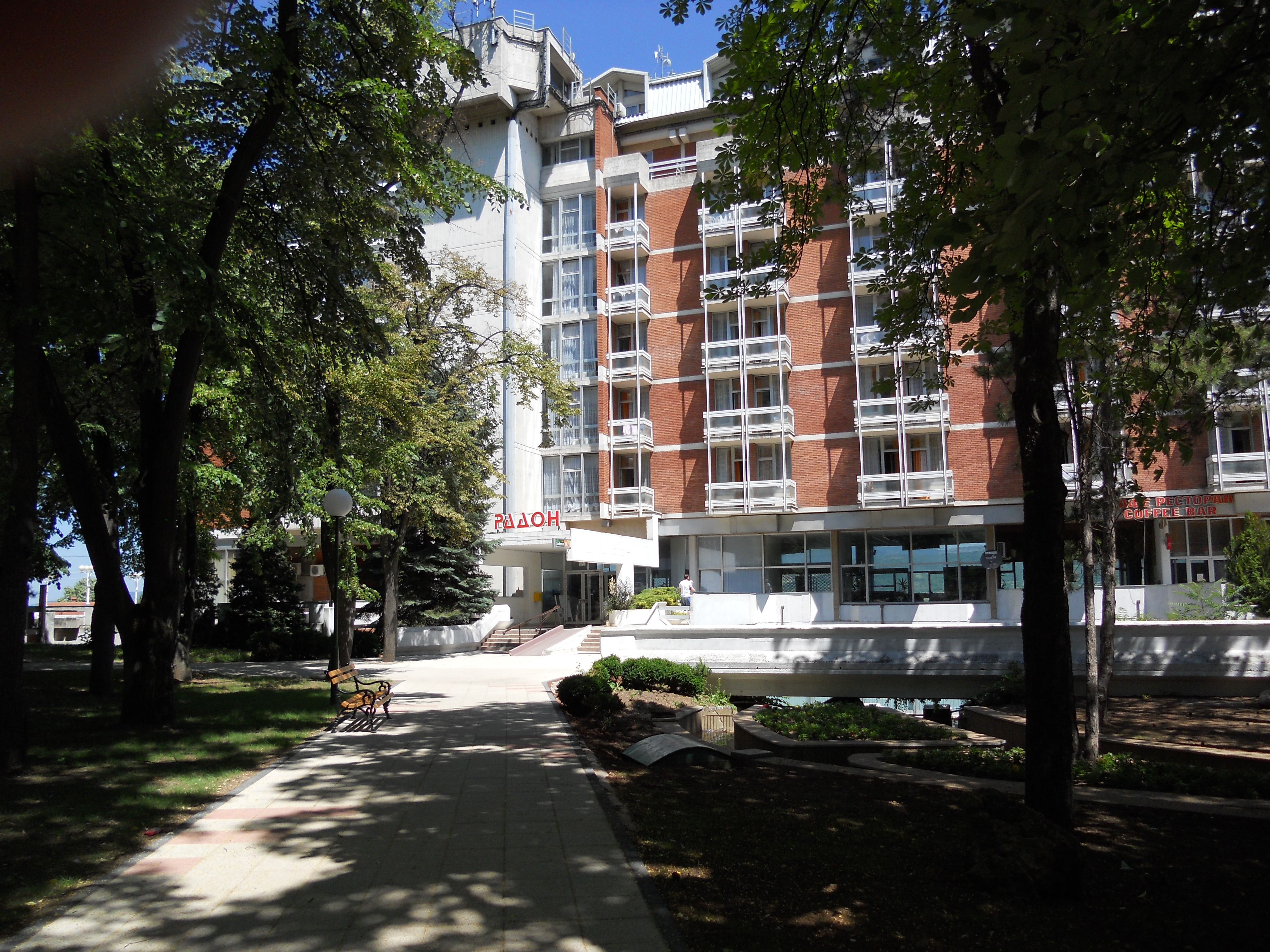 Hotel „Radon“ u Niškoj Banji. Autor: dr Milorad Dimić, Niš, Srbija, 17. jun 2012.